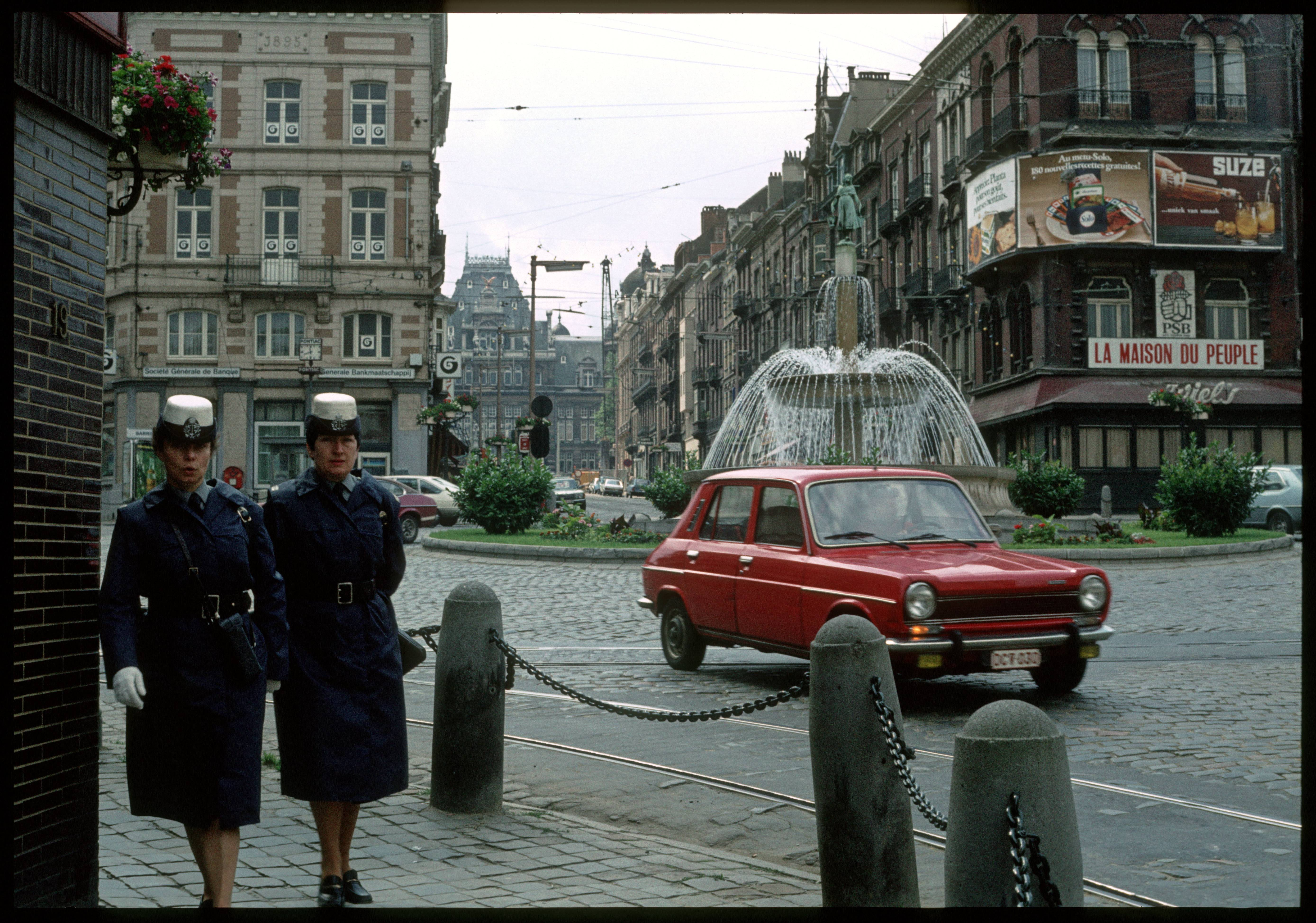 Barrière de Saint-Gilles, Saint-Gilles